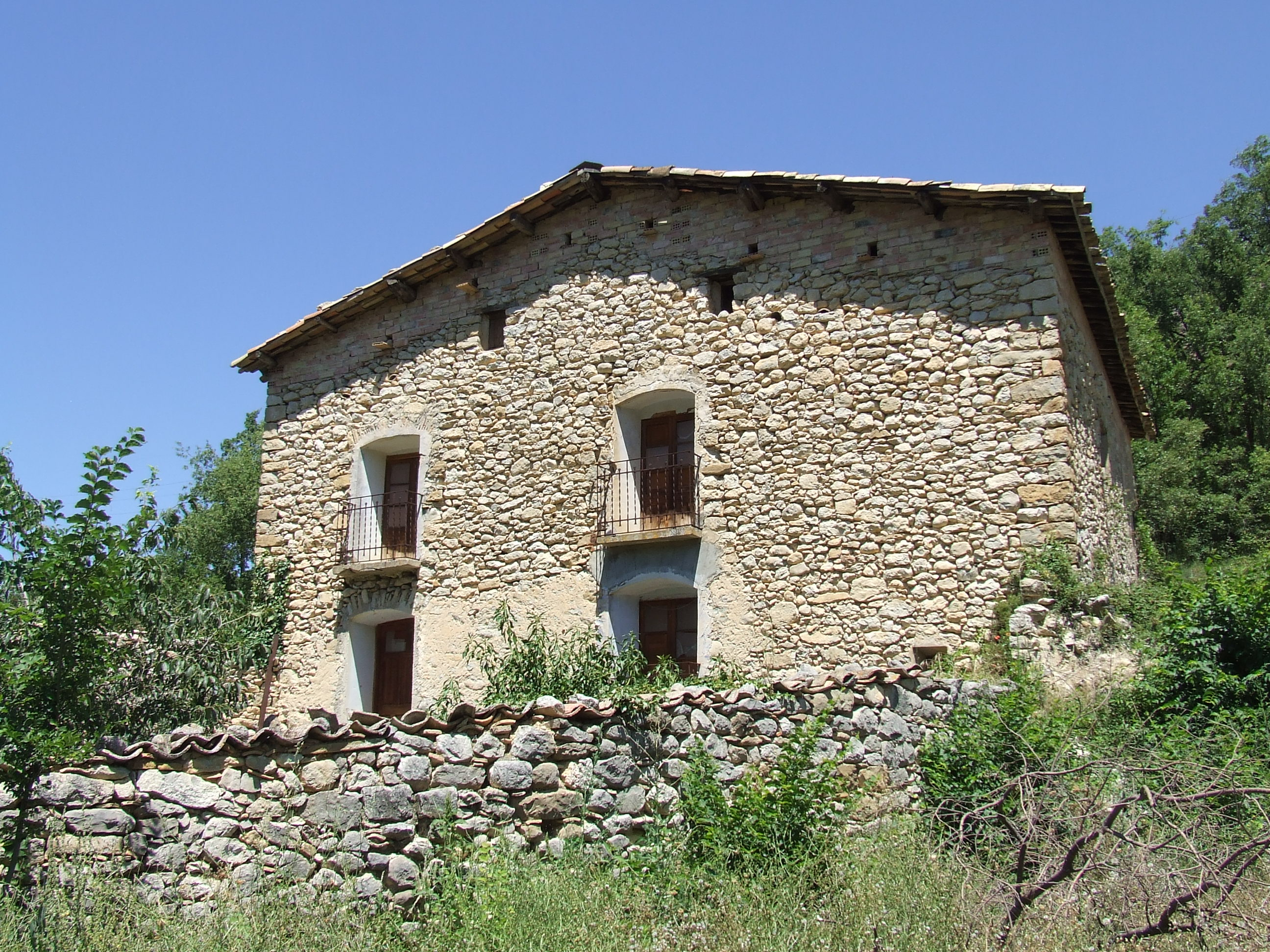 Casa Toà, a Vilanoveta (Hortoneda de la Conca, Conca de Dalt, Pallars Jussà)